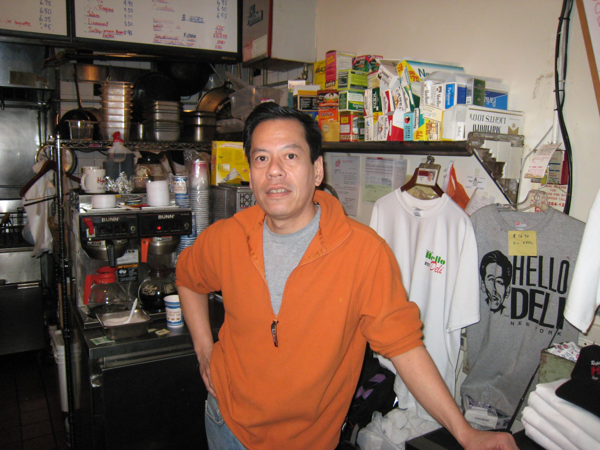 Rupert Jee in his Hello Deli.